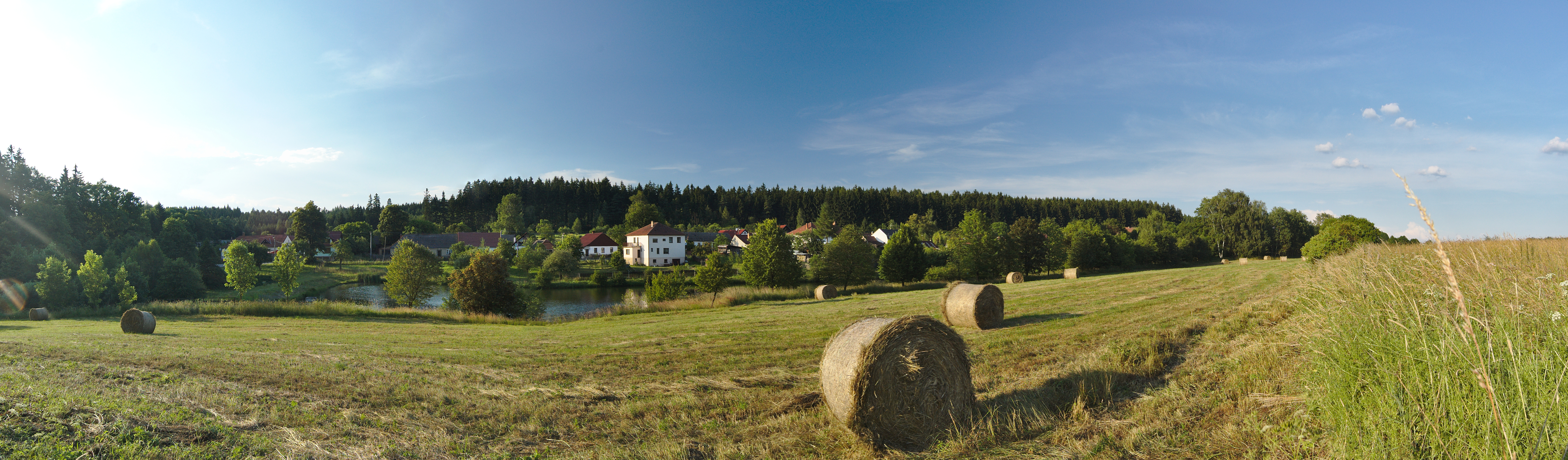 Pohora - panorama od rybníka, Horní Štěpánov, okres Prostějov